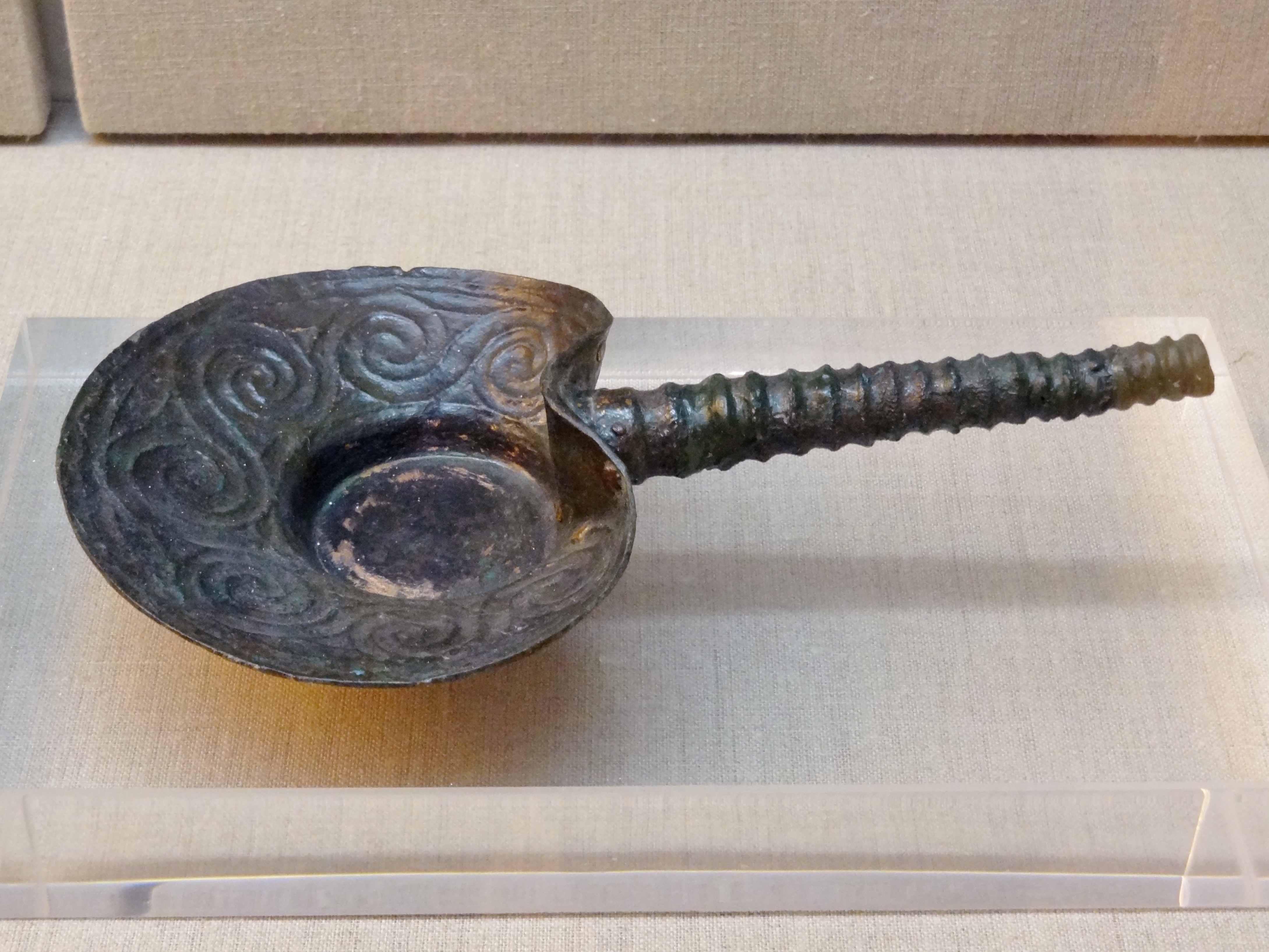 Räuchergefäß für Weihrauch aus Bronze (17. Jahrhundert v. Chr.) aus der Ausgrabungsstätte bei Akrotiri (Santorin) im Prähistorischen Museum von Thira, Santorin (Thira), Kykladen, Griechenland